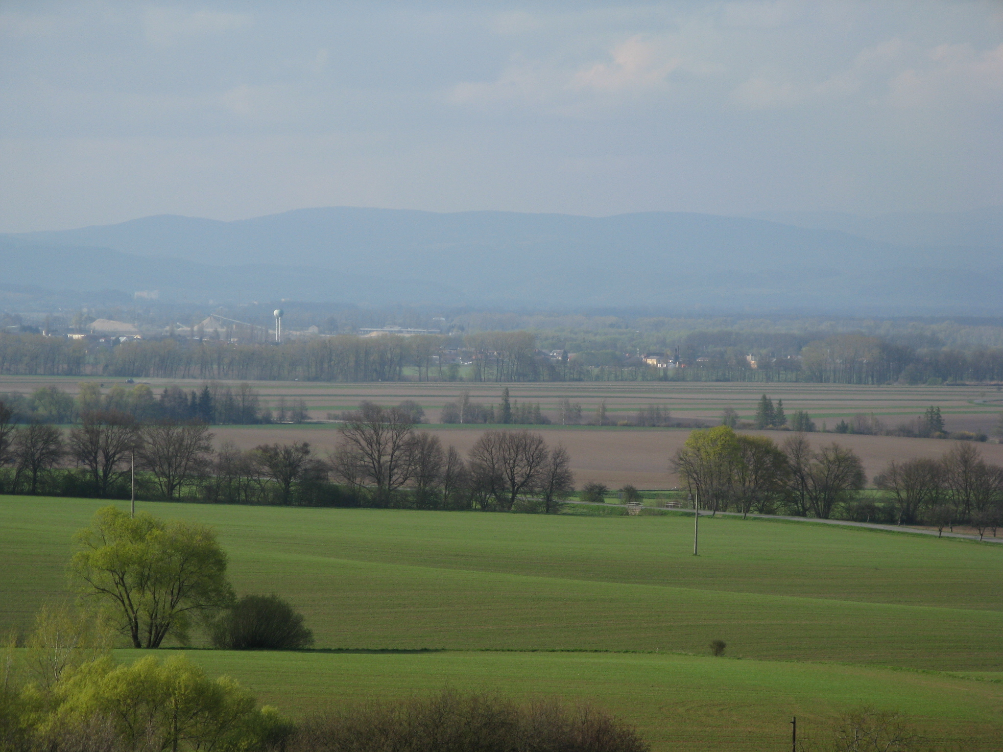 Česky: MB-v pozadí těžba štěrkopísu u Mohelnice